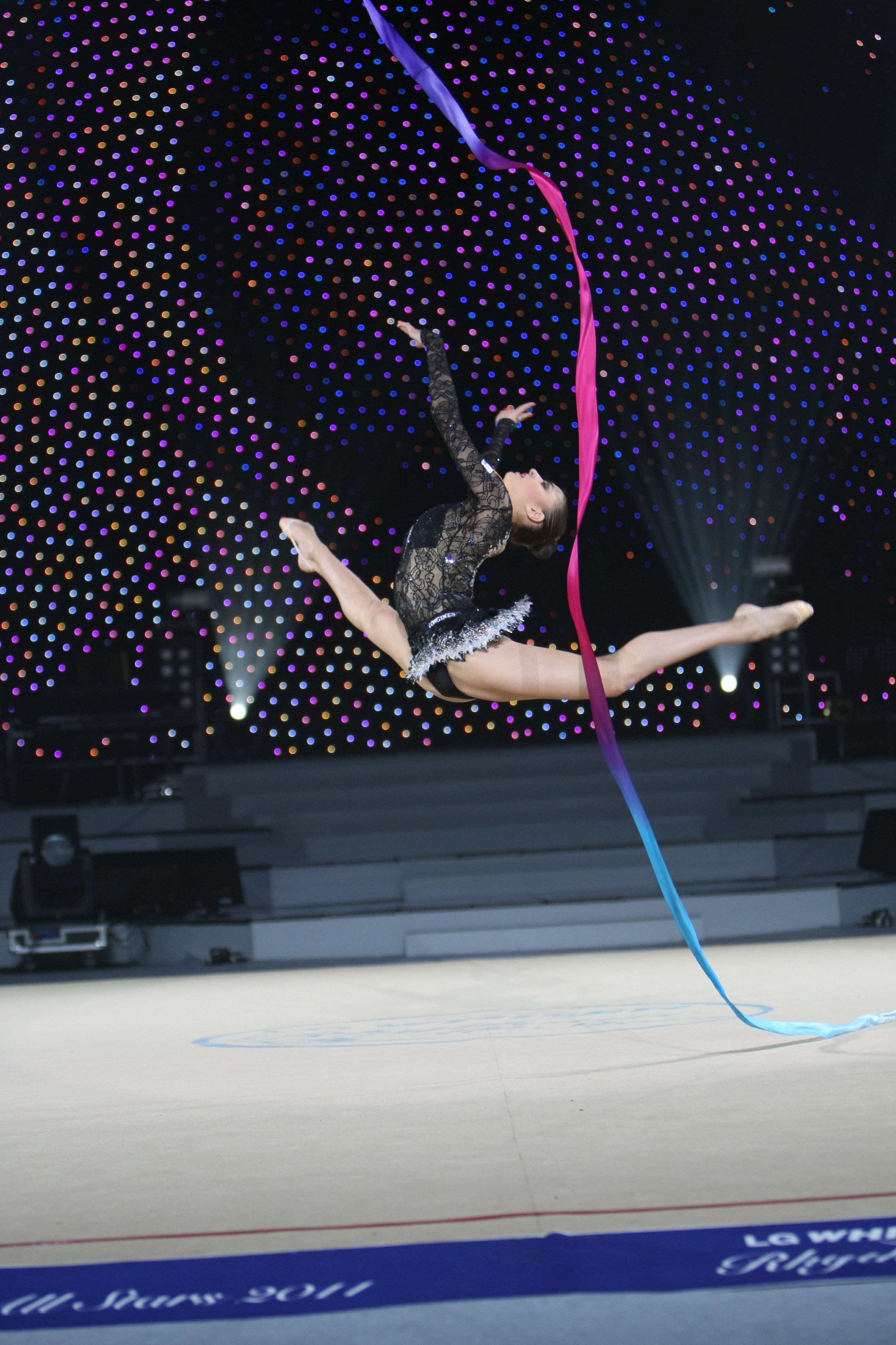 LG전자가 11일(土, 오후 3시), 12일(日, 오후 2시) 양일간 고려대학교 화정체육관 특설무대에서 국내 최초 리듬체조 갈라쇼인 ‘LG WHISEN Rhythmic All Stars 2011’ 행사를 개최했다. 사진은 11일 고려대학교 화정체육관 특설무대에서 열린 ‘LG WHISEN Rhythmic All Stars 2011’ 행사에서 LG ‘휘센’ 광고모델인 손연재(18세, 세종고) 선수를 비롯해 국내외 전•현역 리듬체조 스타들이 총출동해 멋진 리듬체조를 보여줬다.